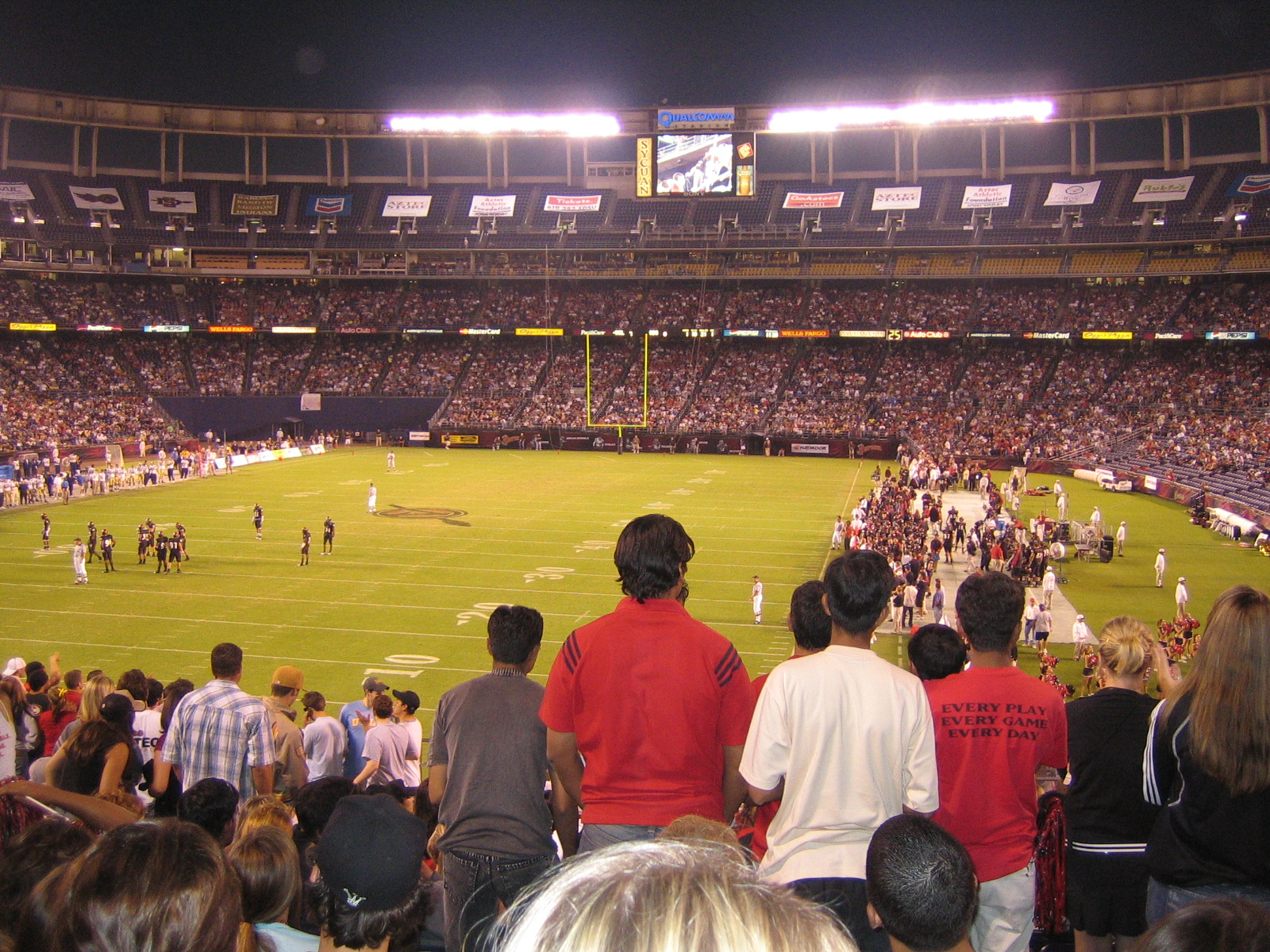 Qualcomm Stadium - SDSU Aztecs vs UCLA College Football